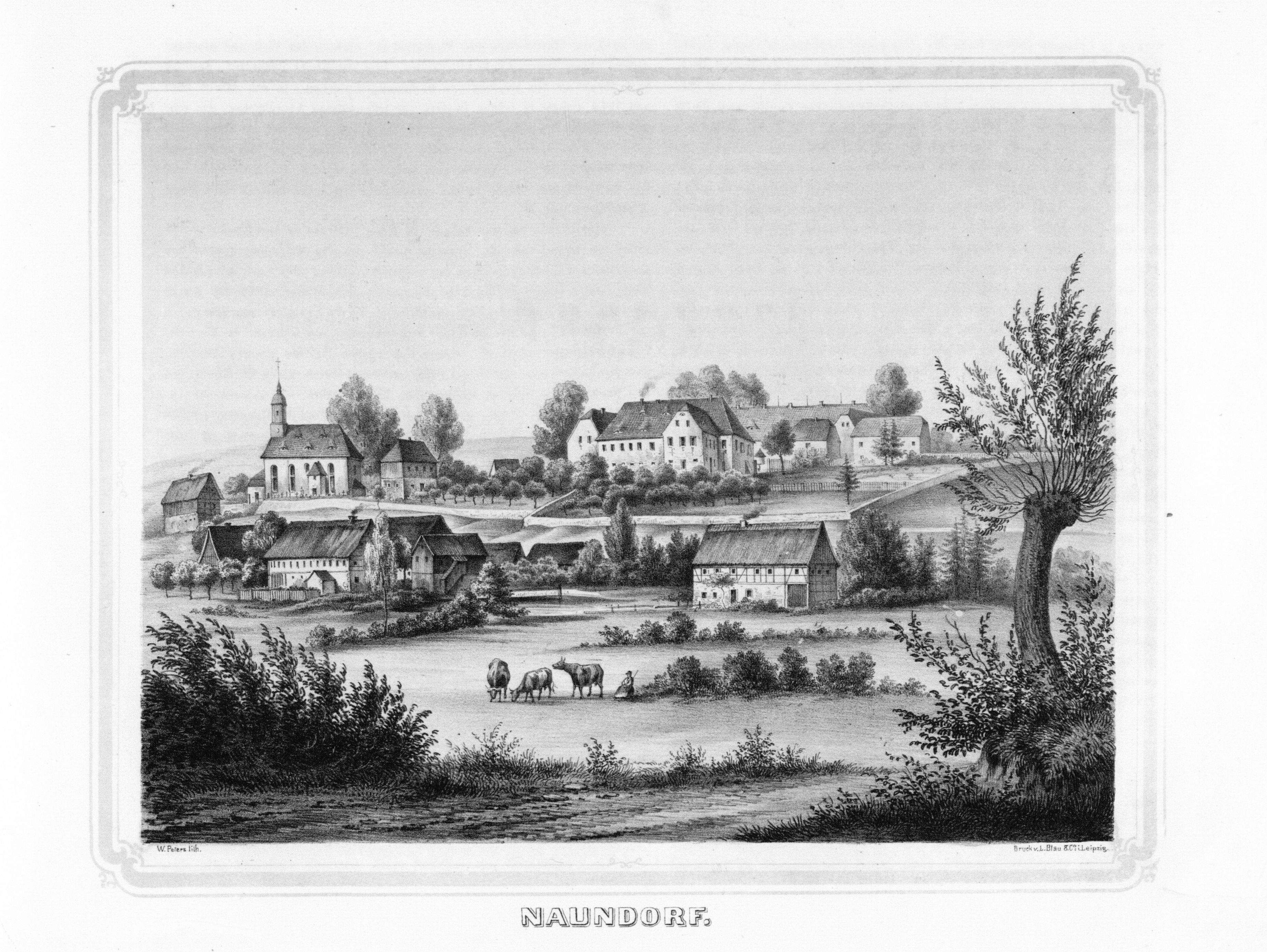 Naundorf aus: Album der Rittergüter und Schlösser im Königreiche Sachsen Erzgebirgischer Kreis Section: IV